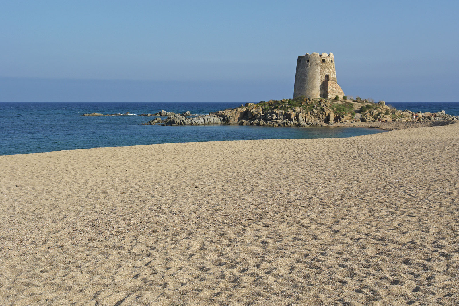 Torre di Bari bei Marina di Bari der Gemeinde Bari Sardo, Ostküste, Sardinien